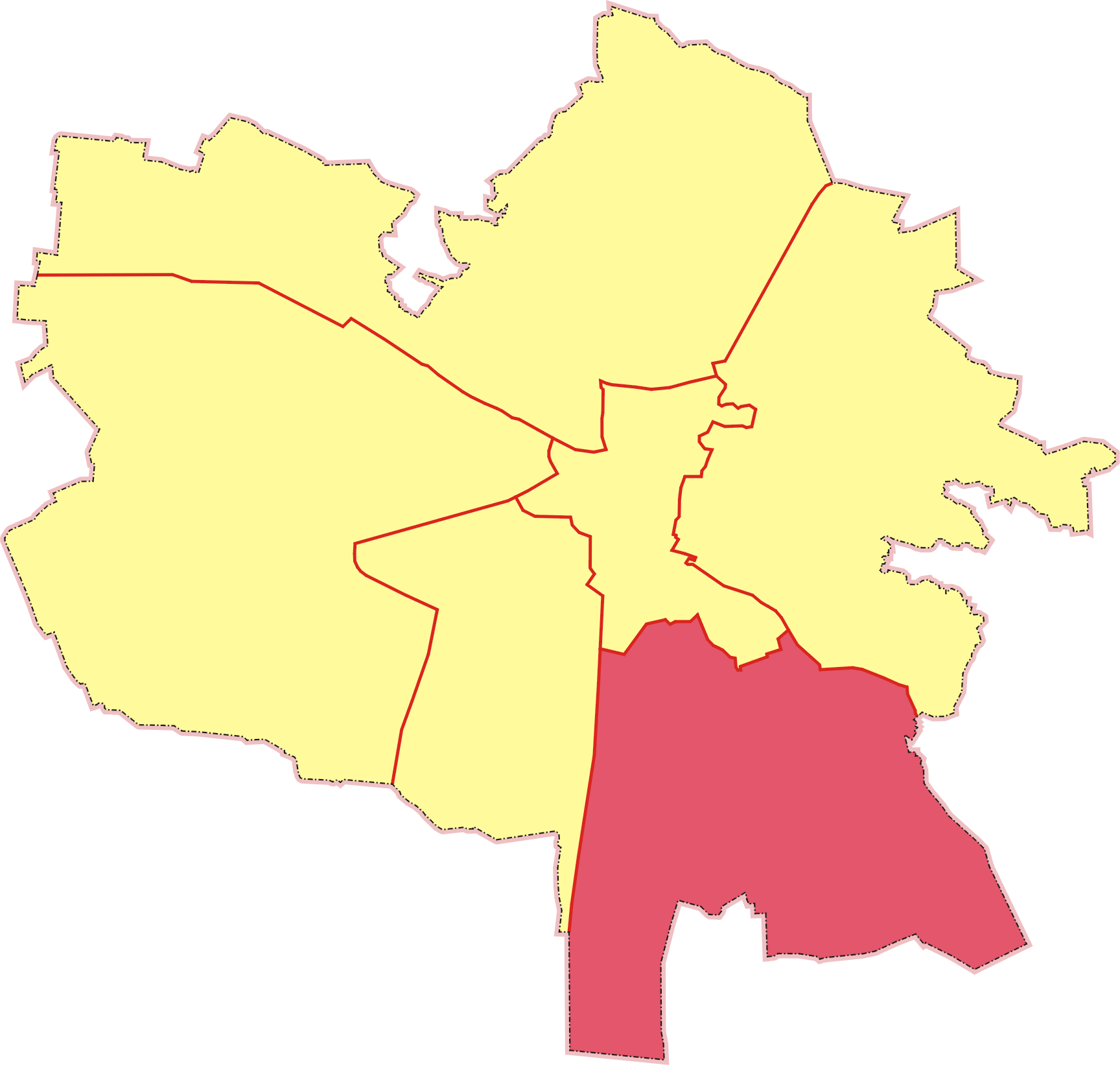 Położenie rejonu sichowskiego na mapie Lwowa